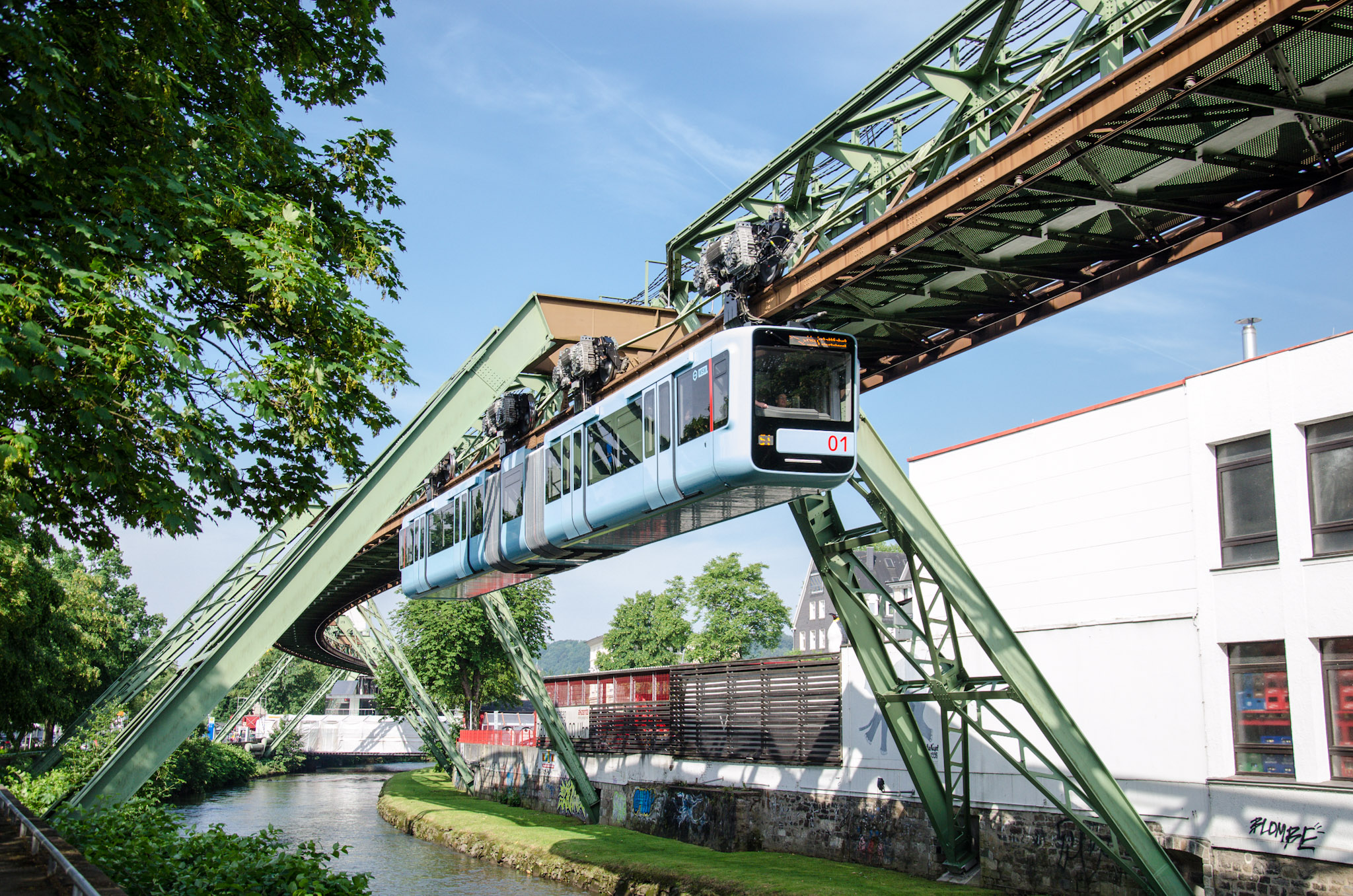 Schwebebahngeneration G15 auf erster Testfahrt am Tag auf offener Strecke zwischen Station "Adlerbrücke" und "Alter Markt"